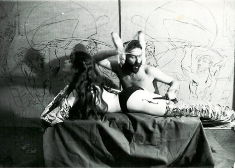 Piotr Szmitke, Musique sur une femme et un âne